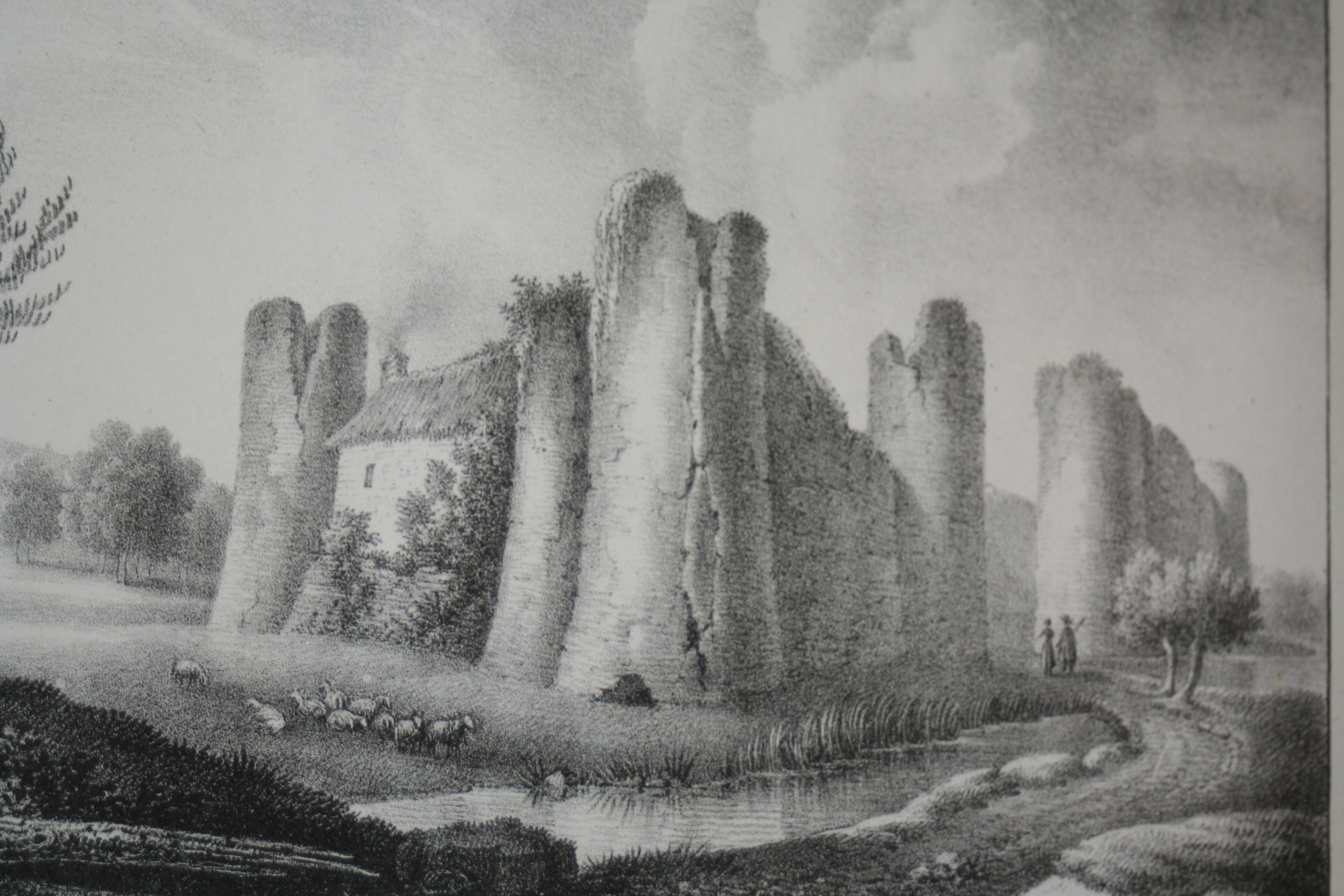 Lithographie d'Engelmann montrant le château de Courcy en 1826